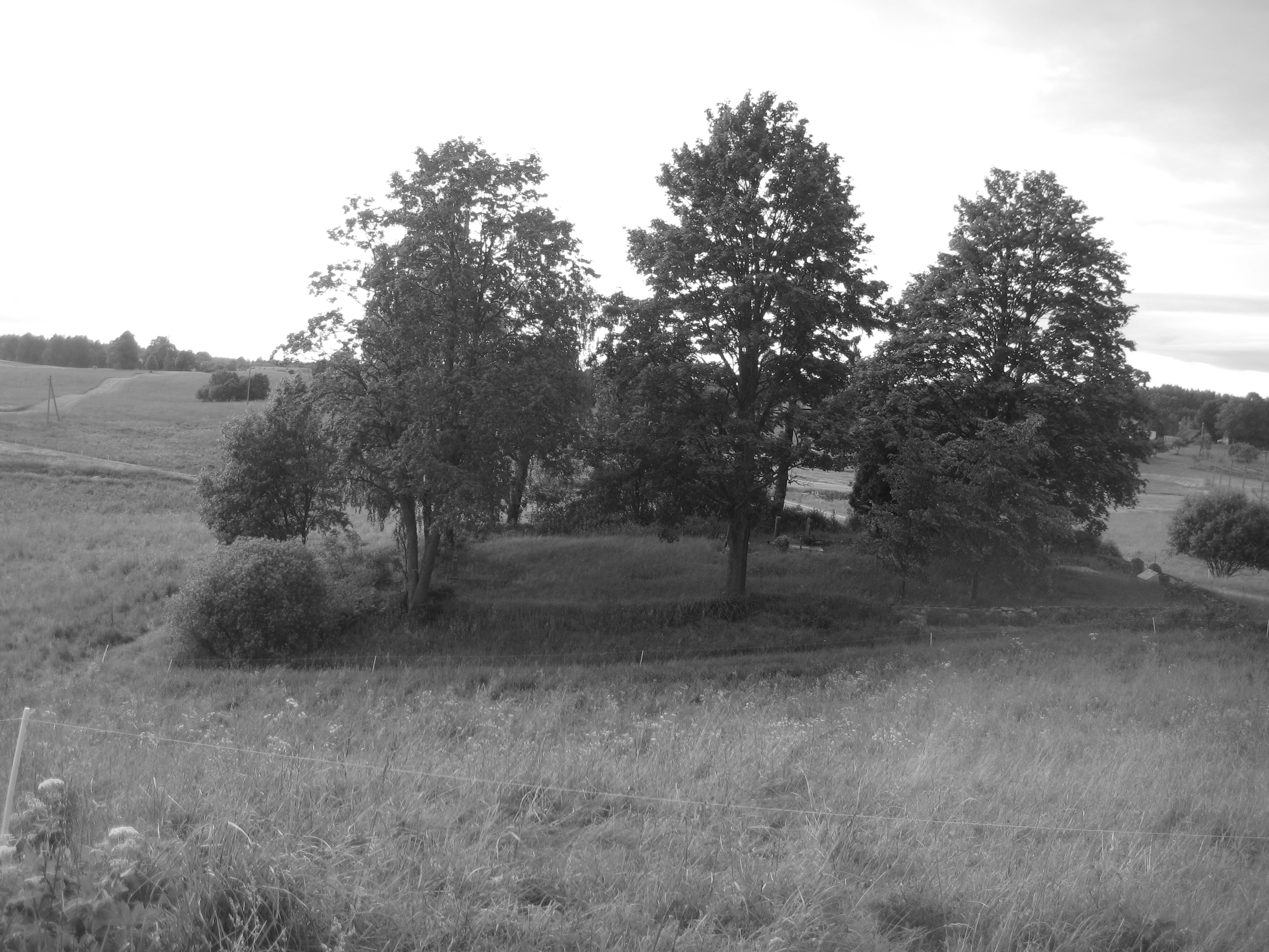 Šlepečiai 28412, Lithuania